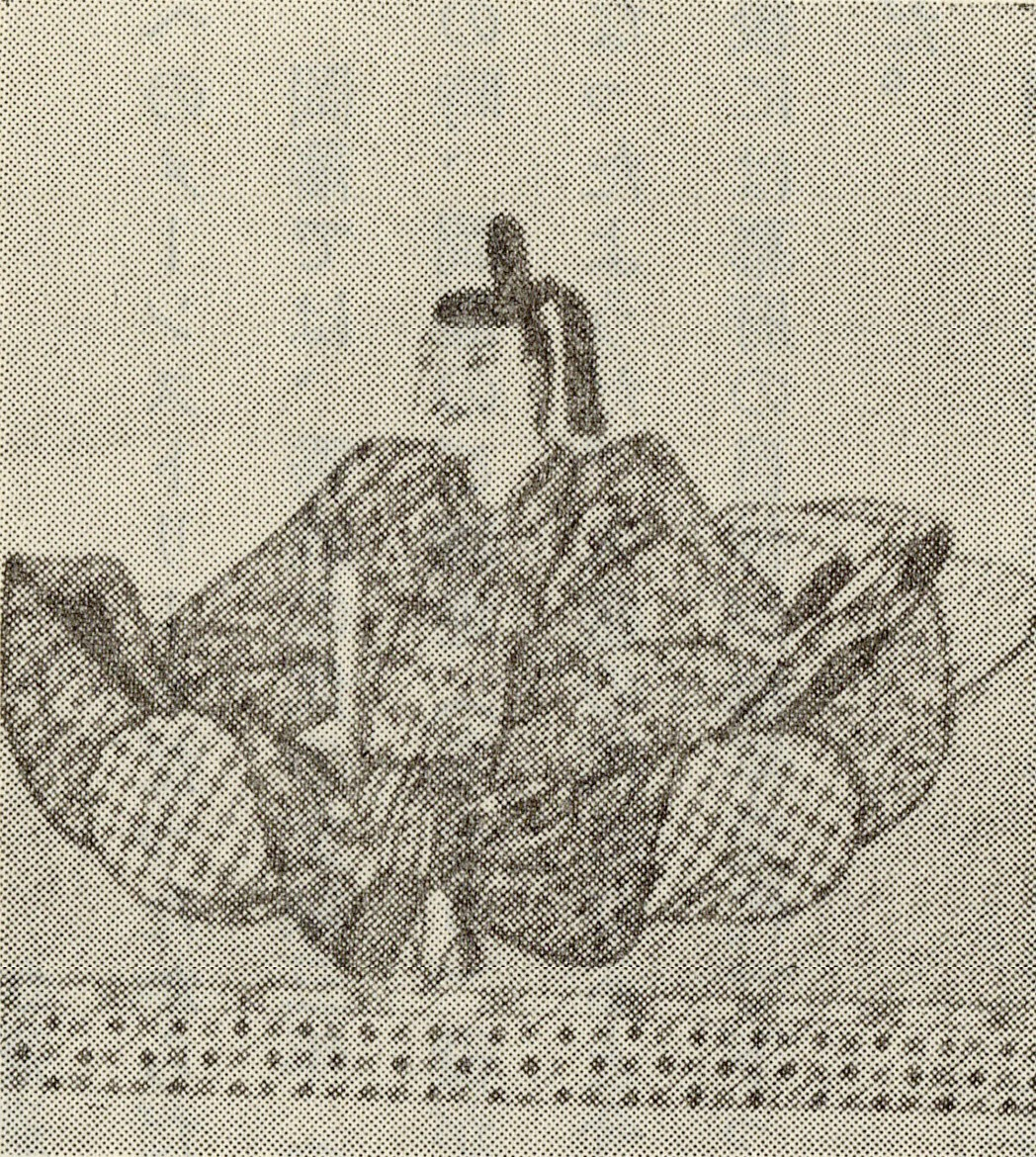 中川久盛の肖像(モノクロ)。